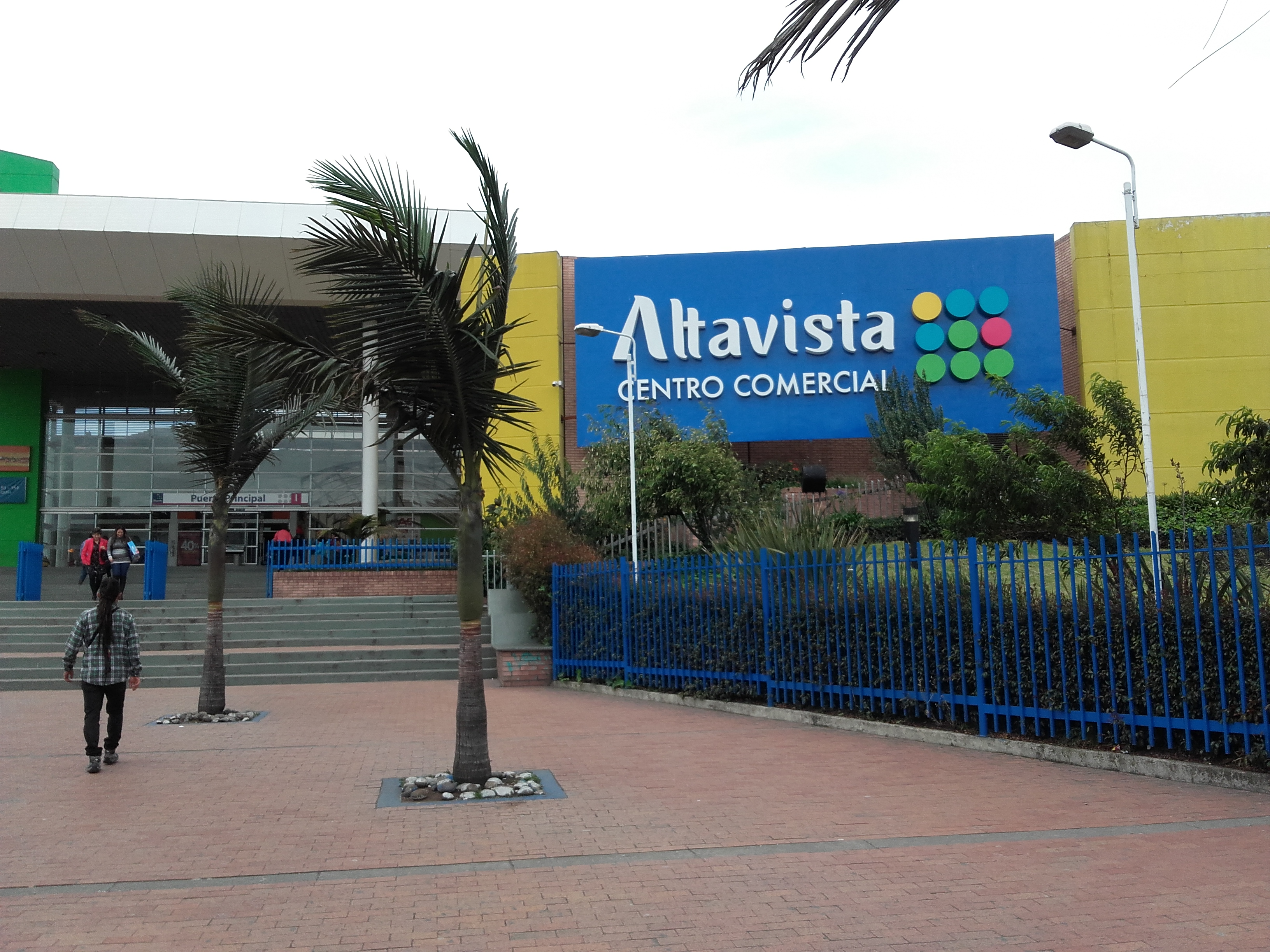 ndmfmfmgmgmgmg